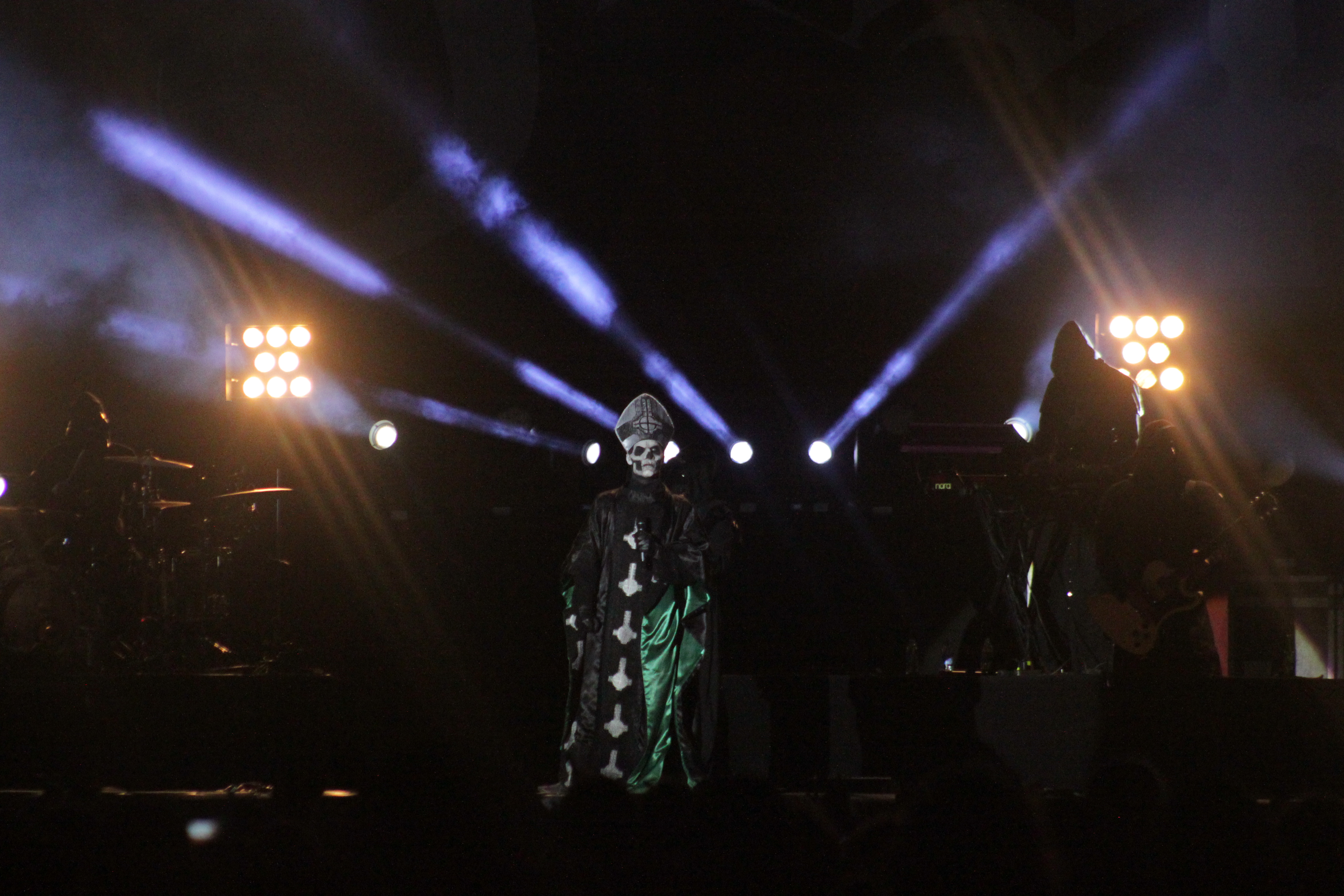 Papa Emeritus II, Ghost, Helfest 2013, Fr-44-Clisson.